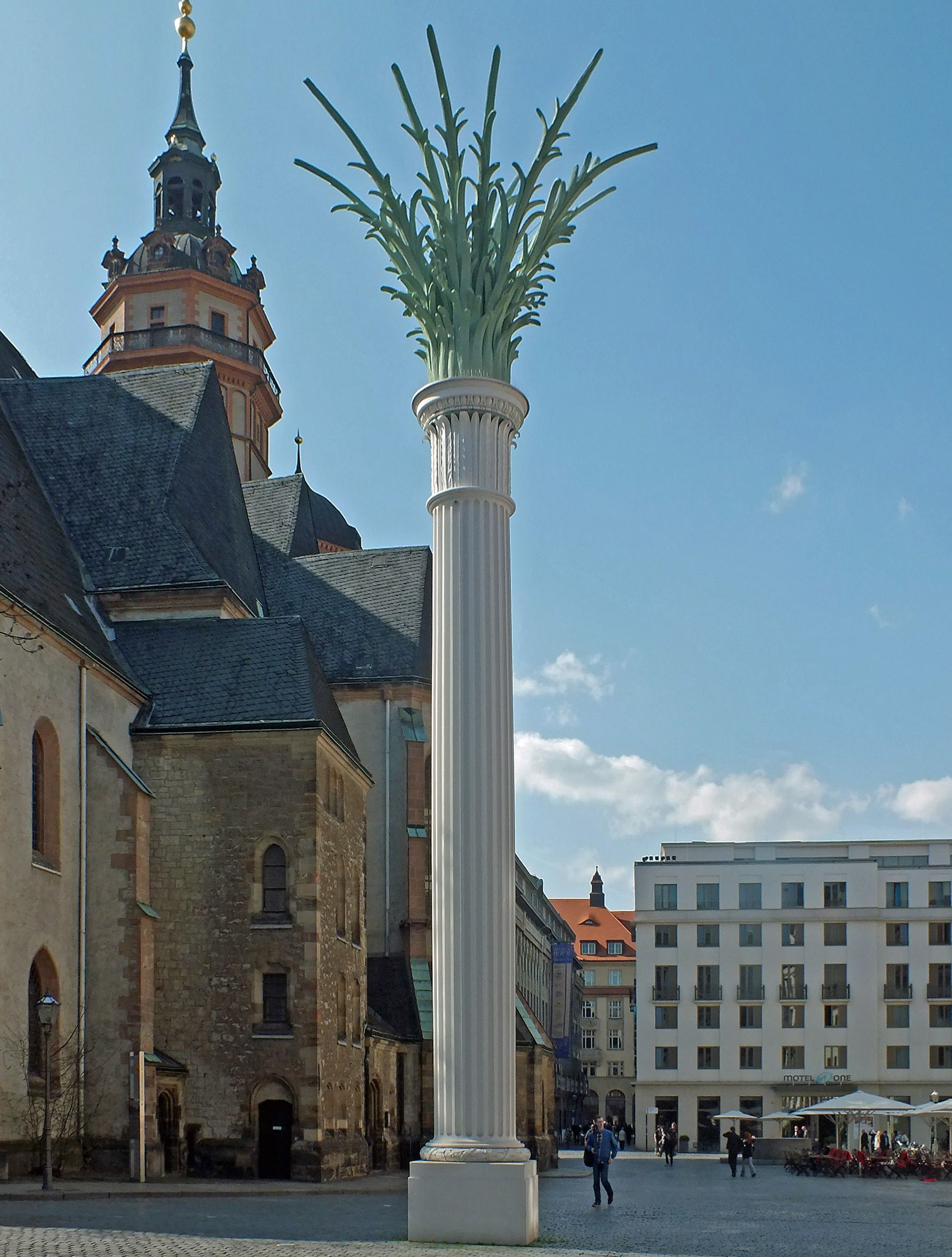 Die Säule auf dem Nikolaikirchhof in Leipzig zum Andenken an die Montagsdemonstrationen